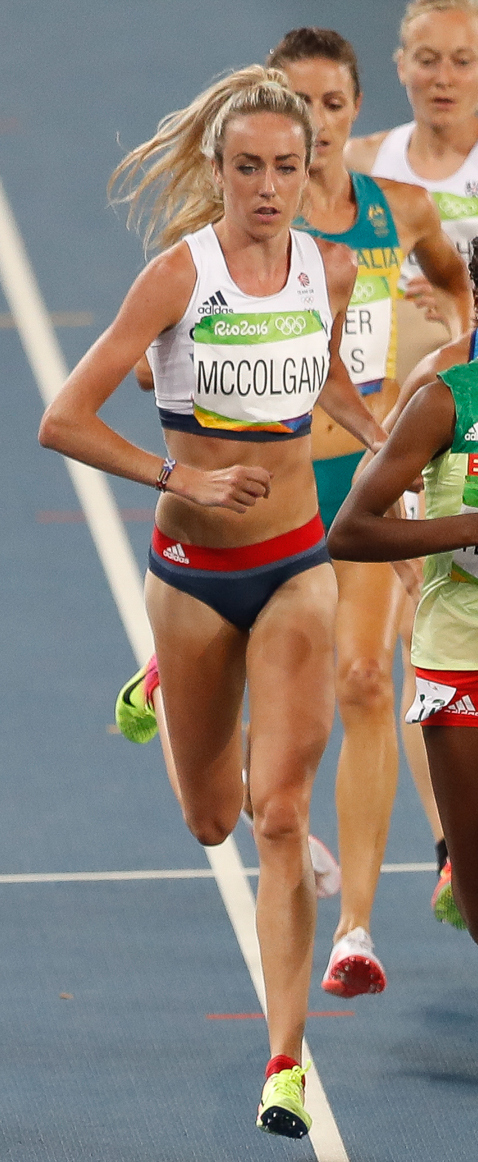 Rio de Janeiro - A queniana Vivian Jepkemoi Cheruiyot vence final e bate recorde olímpico dos 5 mil metros nos Jogos Rio 2016, no Estádio Olímpico (Fernando Frazão/Agência Brasil)